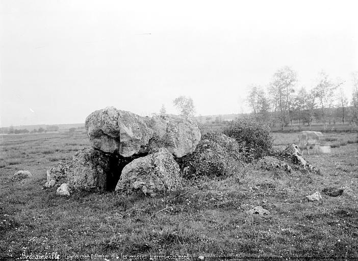 Dolmen des Grosses-Pierres, Brévainville, Loir-et-Cher, France